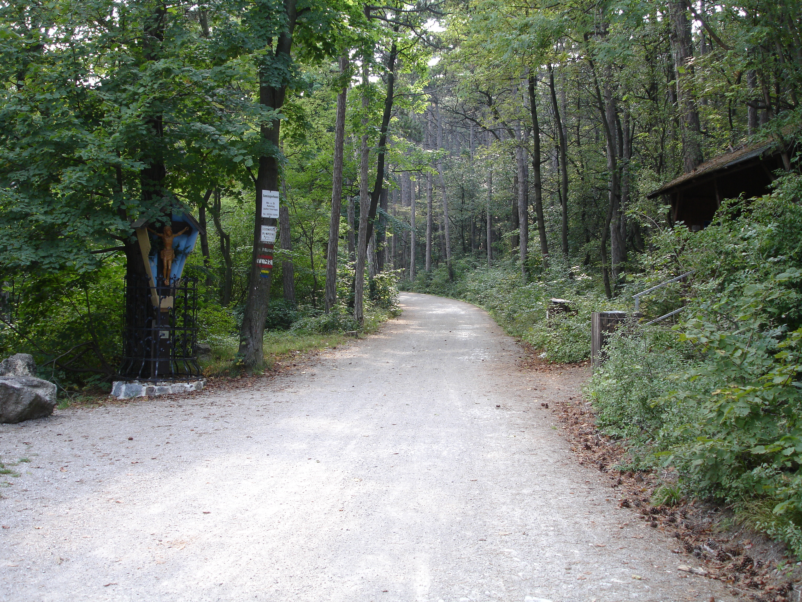 Anningerstraße am Berg Anninger beim ehemaligen Platz der Breiten Föhre. Links ist das 2004 wiederaufgestellte Wegkreuz zu sehen.